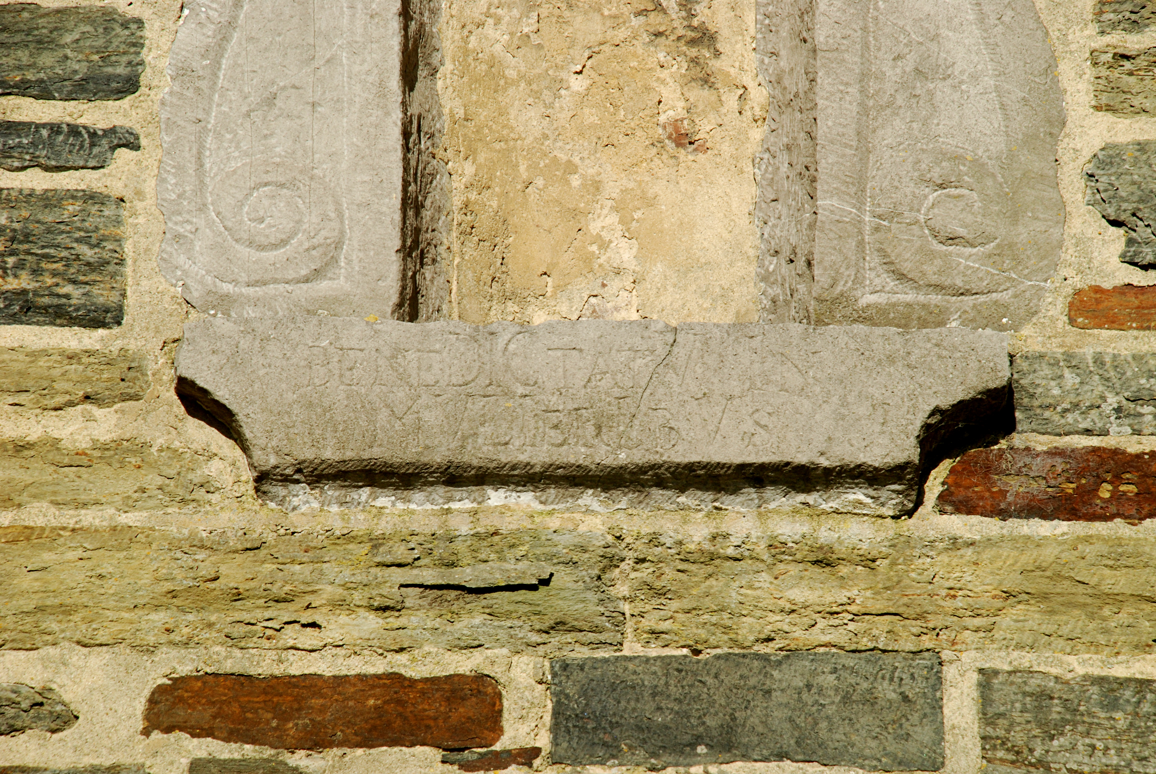 Belgique - Brabant wallon - Villers-la-Ville - Église Notre-Dame de la Visitation